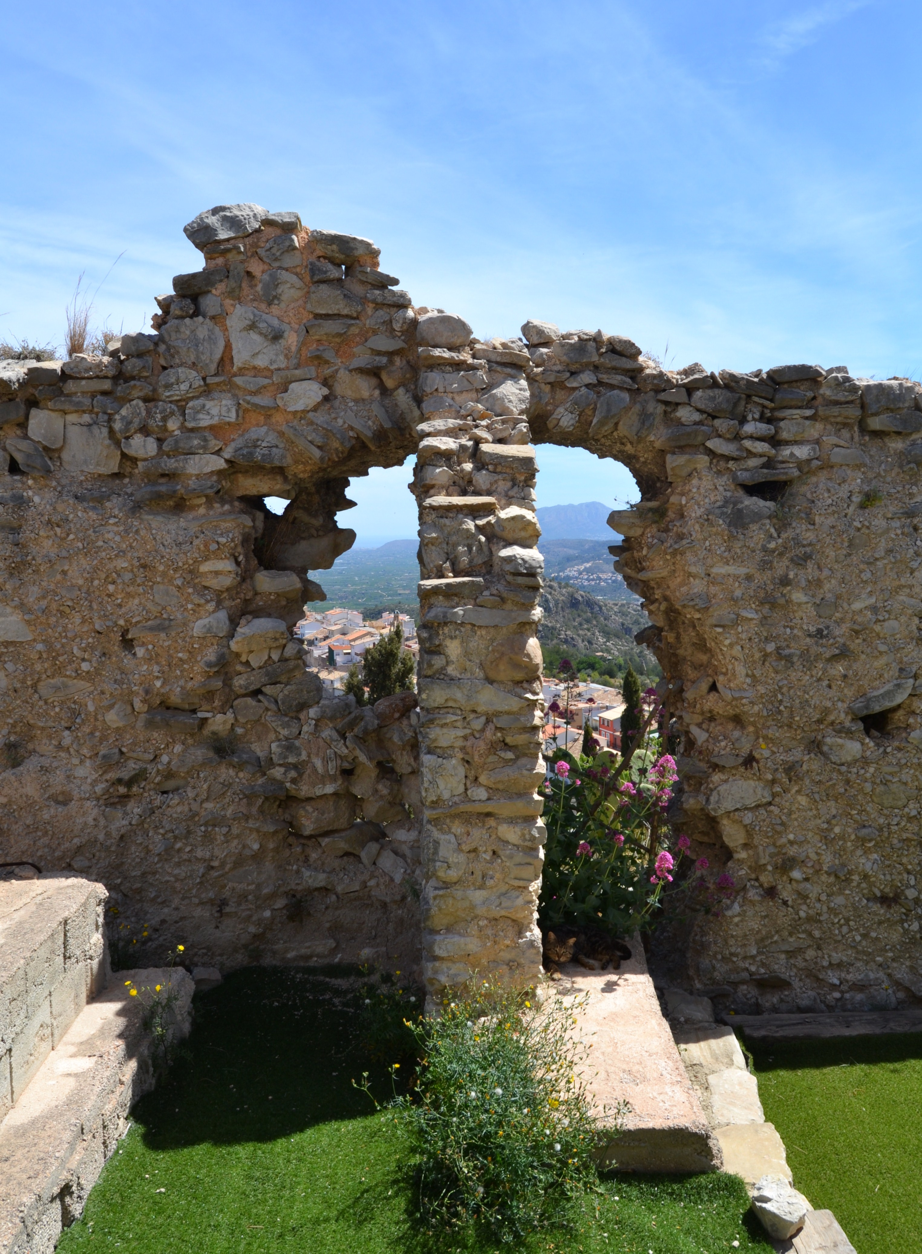 Torre de la Casota de la Vall de Laguar, mur amb obertura.